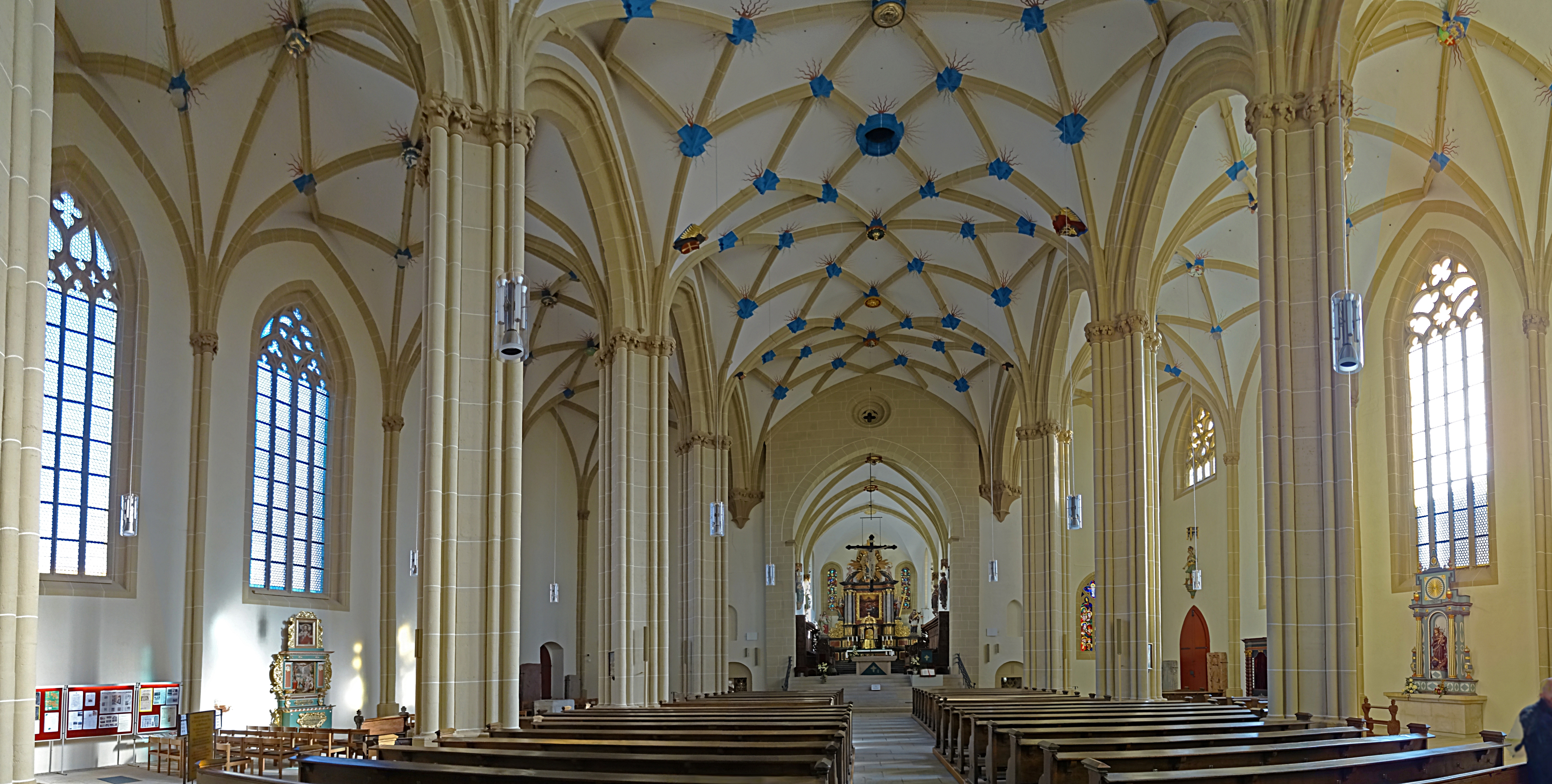 Innenraum-Panorama des Nordhäuser Doms